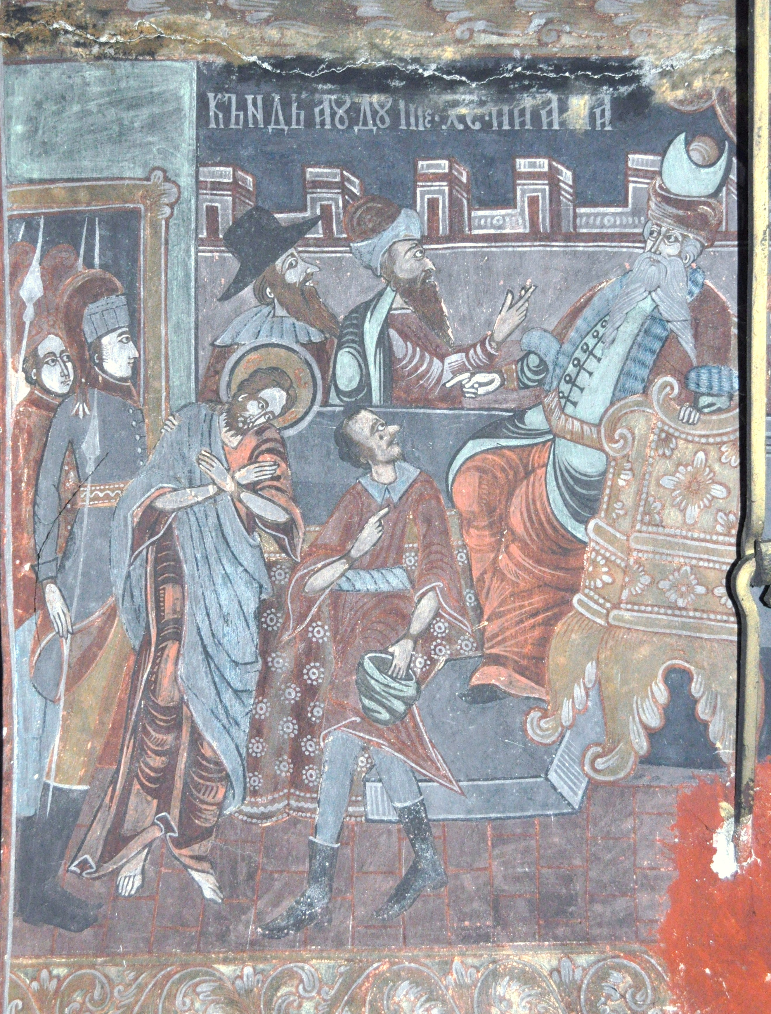 Biserica „Cuvioasa Paraschiva” din Țichindeal, județul Sibiu